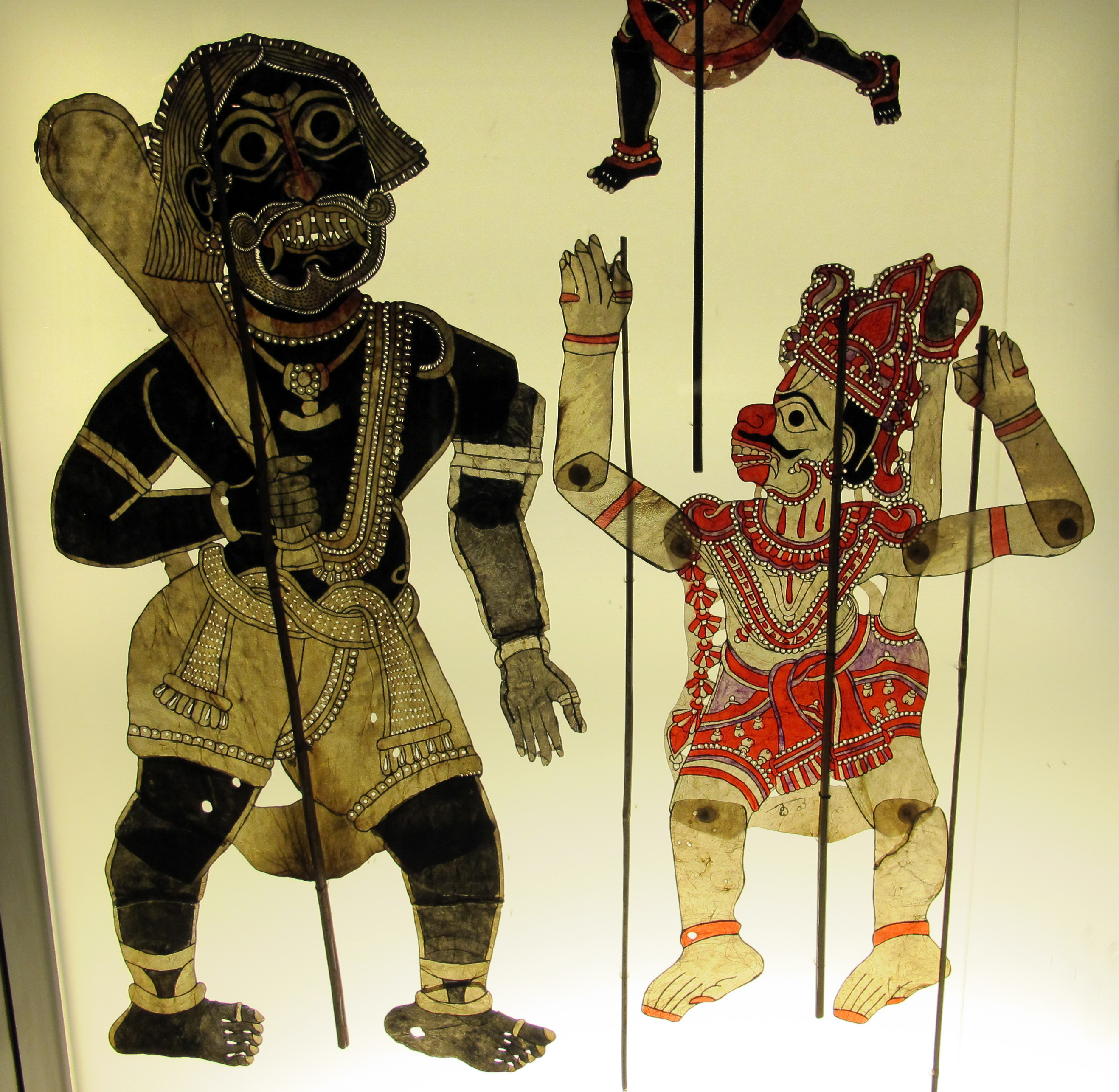 Musée du quai Branly